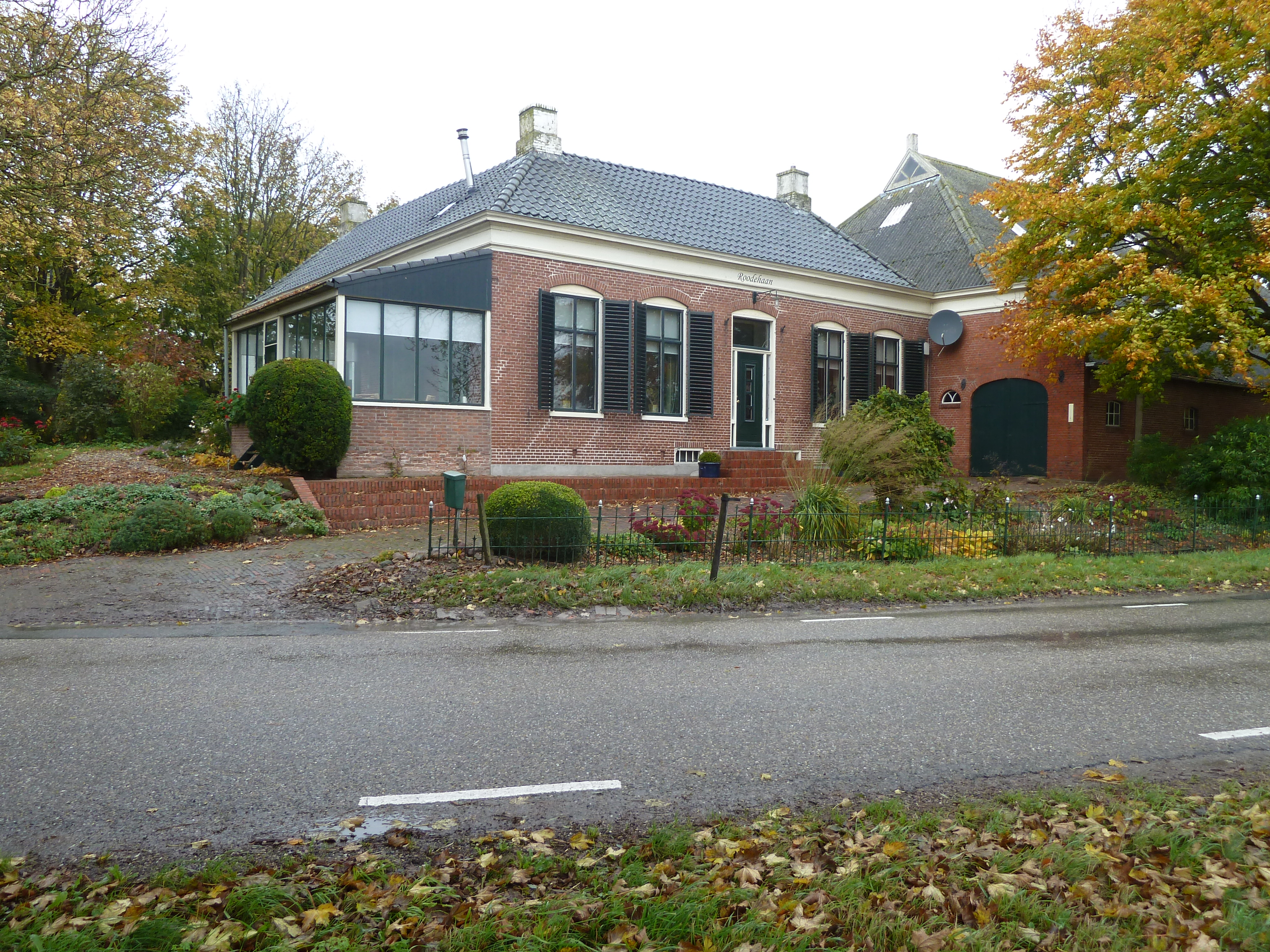 Boerderij op de plek van het voormalige veerhuis van Roodehaan. Het veerhuis werd voor het eerst genoemd in 1559. De bekendste eigenaar was Jan van Julsing(h)a (rond 1800), de latere burgemeester van Wehe-den Hoorn. In 1825 bezweek het veerhuis na een storm en werd herbouwd. Jarenlang was er tevens een café in gevestigd. Het gebouw had toen een veranda aan voorzijde. Op een prentbriefkaart uit 1906 staat 'Bondshotel Roodehaan' op de gevel. In 1906 werd het veer ook opgeheven. In 1921 sloot het café. Later werd het gebouw omgevormd tot waterschapshuis van het waterschap Reitdiep en nog later werd het een boerderij. De veranda is later vervangen door een serre. Het woord 'Roodehaan' stond in de jaren 1970 boven de deur van de schuur.